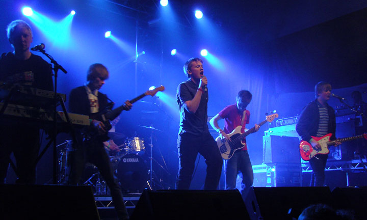 Icelandic band Jakobínarína, 2006.